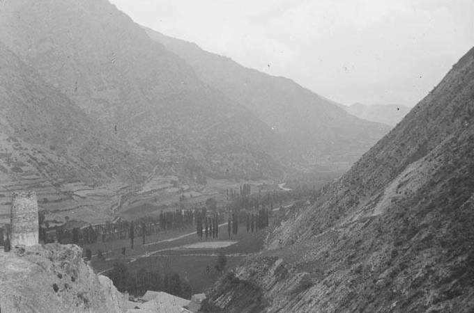 Imatge